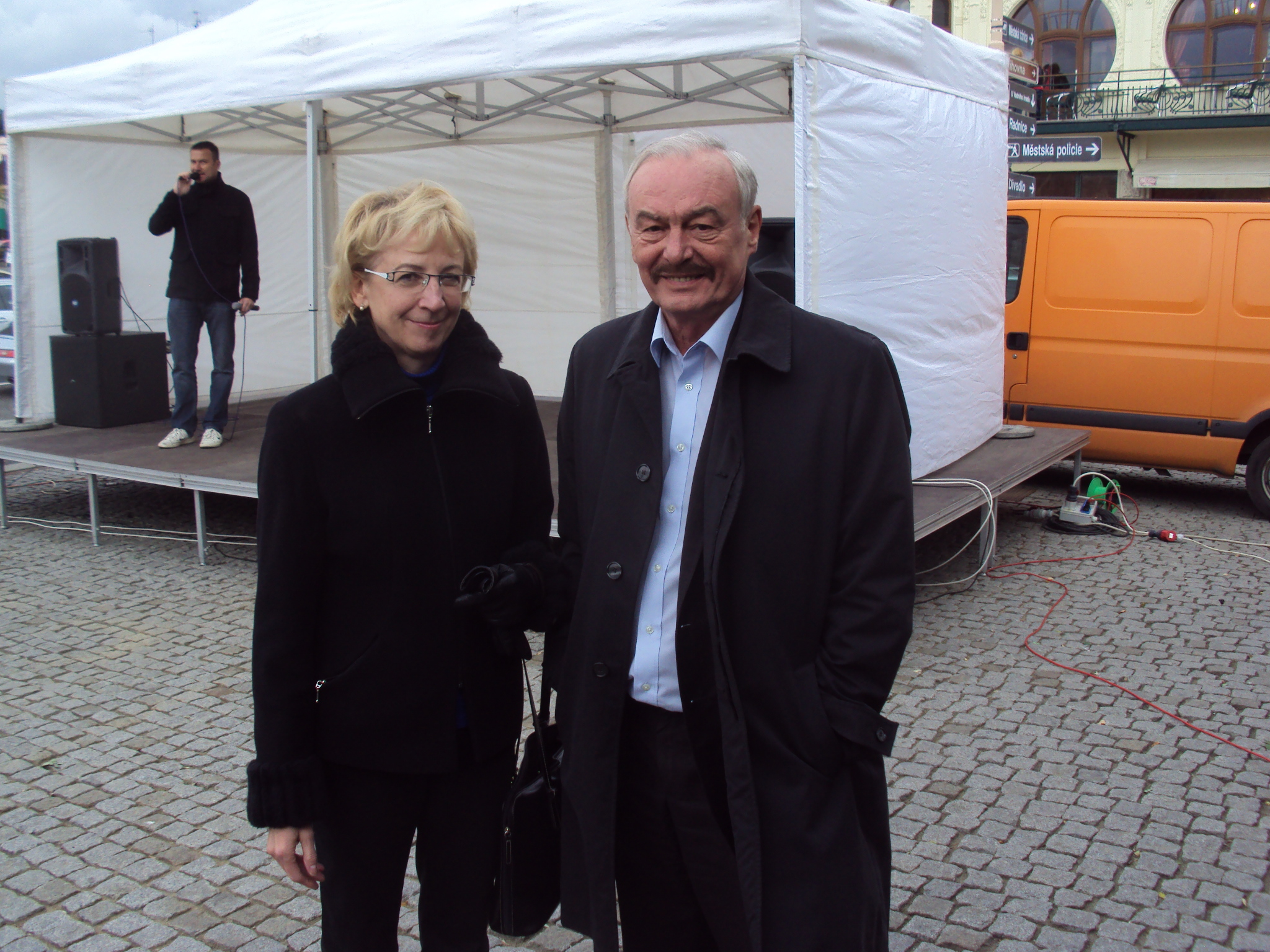 Předvolební meeting ODS v České Lípě, pózovali mi ochotně Ing Eva Bartoňová a MUDr Přemysl Sobotka